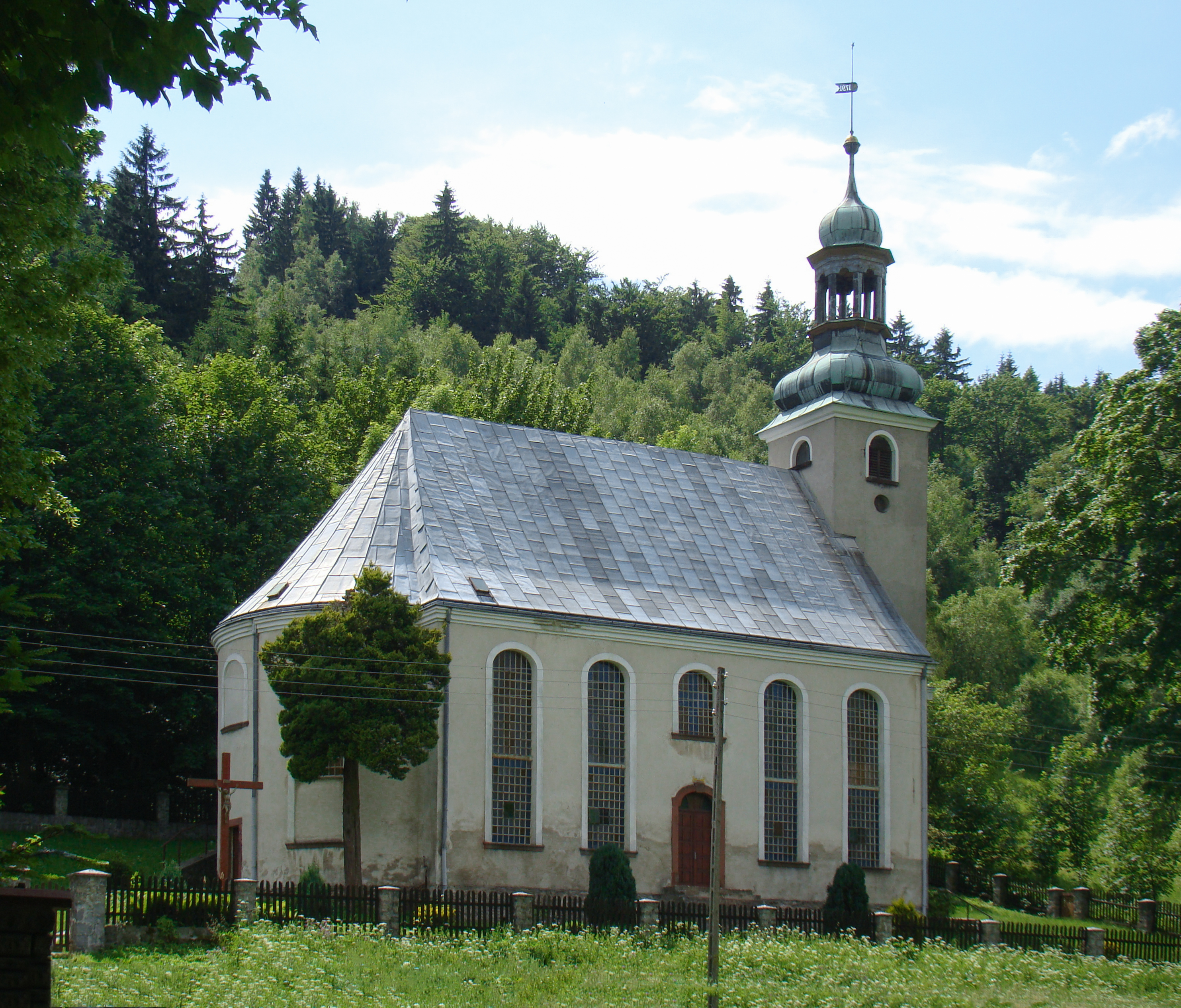 Rzeczka - dawny kościół ewangelicki, ob. rzym.-kat. p.w. św. Maksymiliana Kolbe, 1796